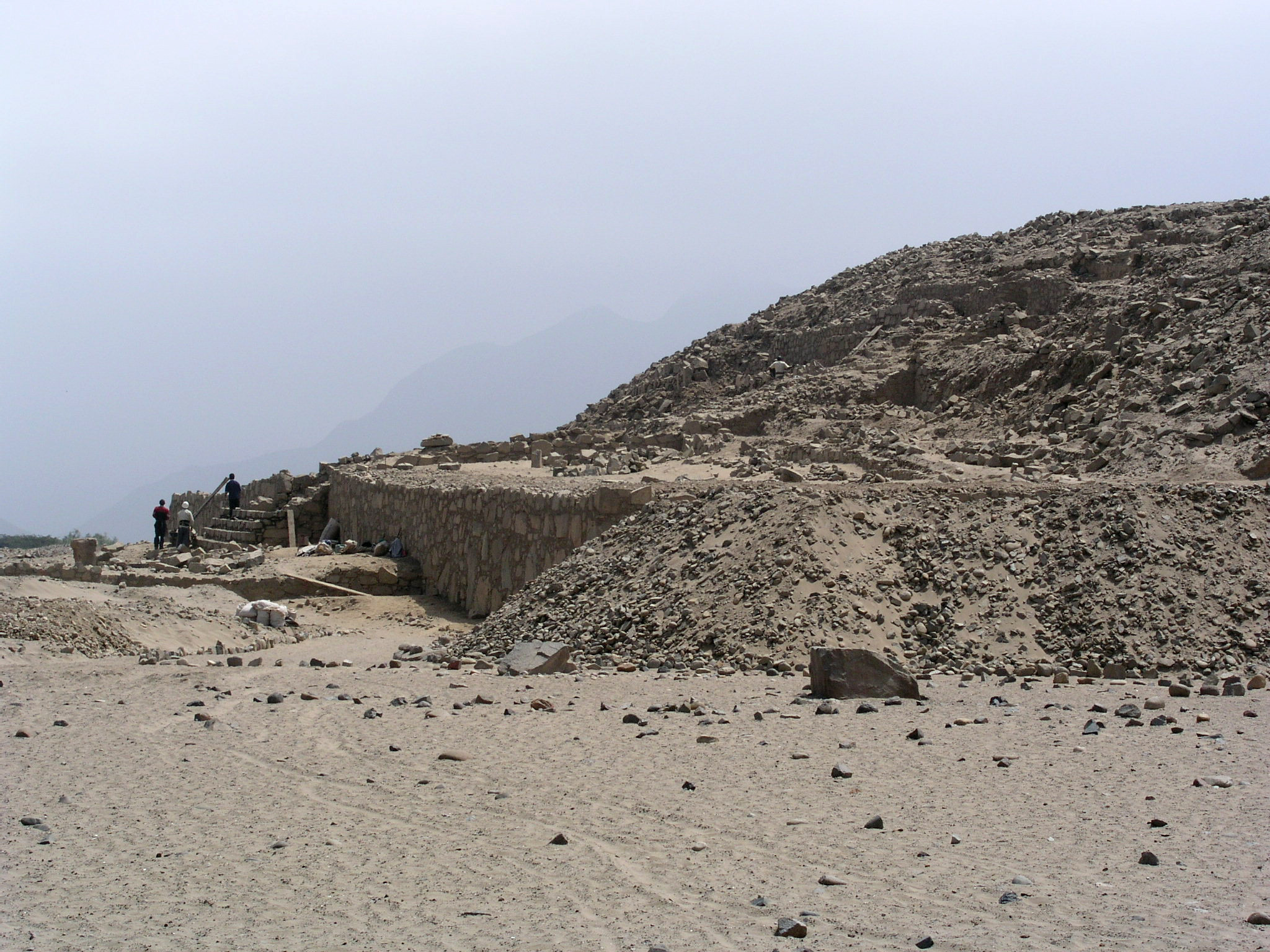 Pirámides en Caral, Valle de Supe, Region Lima, Peru.